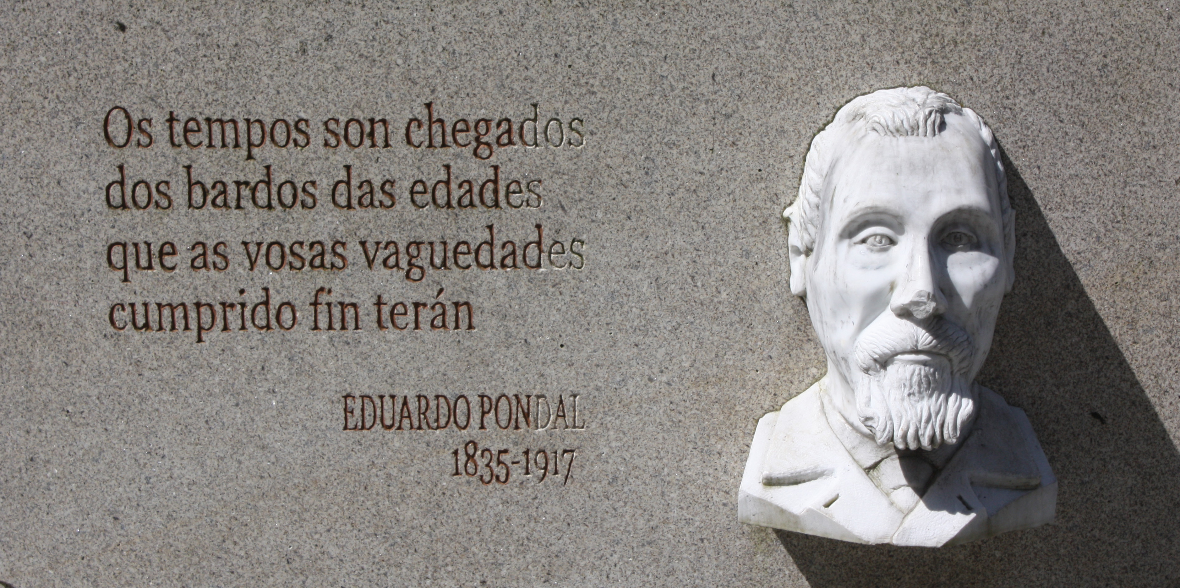 Placa na honra de Eduardo Pondal, na praza Maior de Lugo